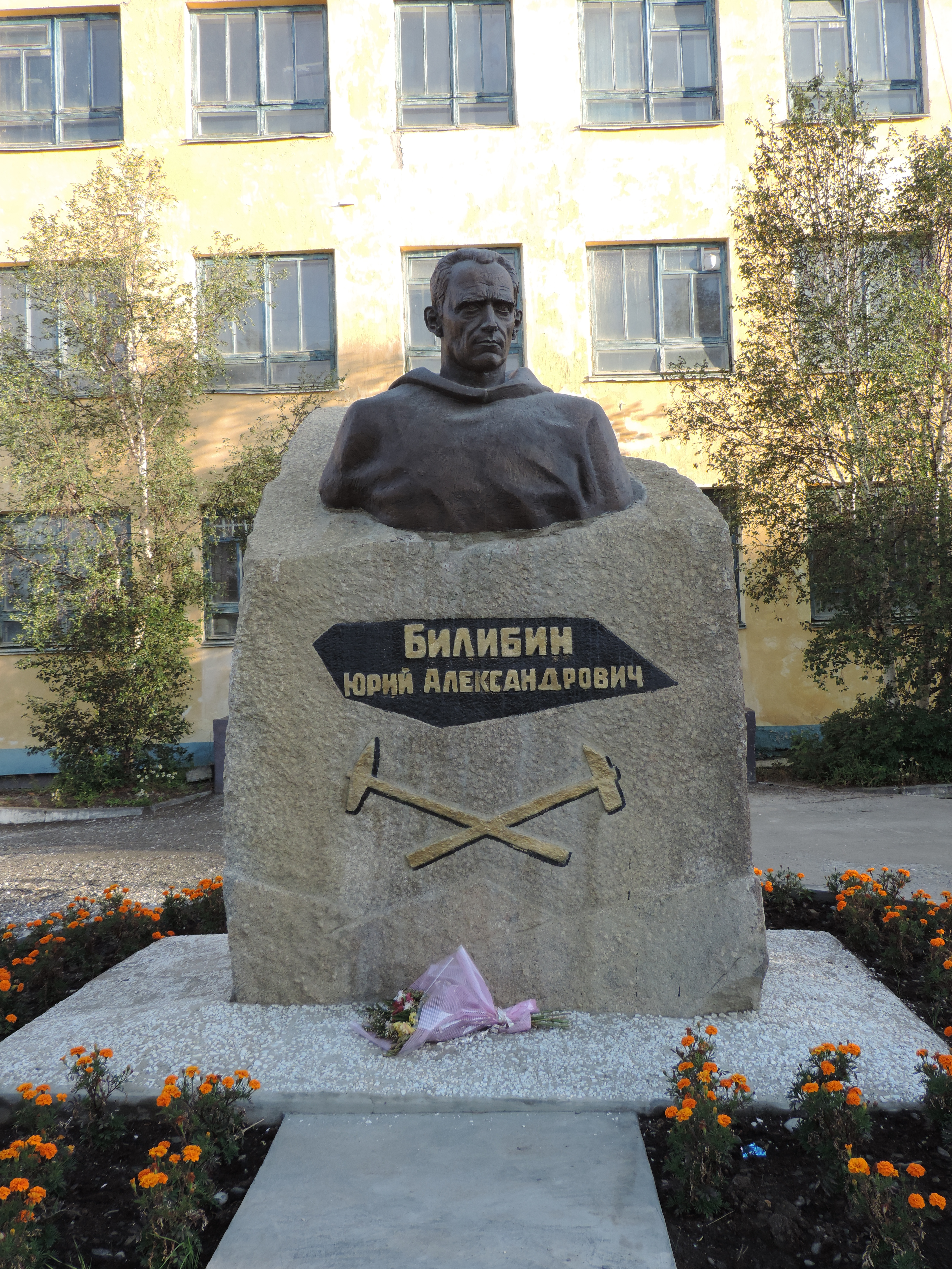 Bilibinsky District, Chukotka Autonomous Okrug, Russia